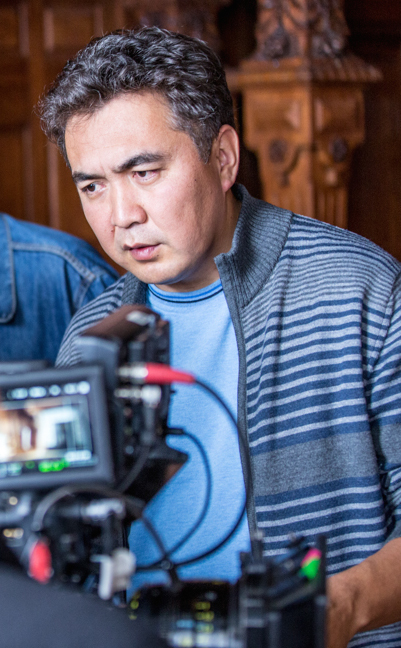 Egen bei der Arbeit